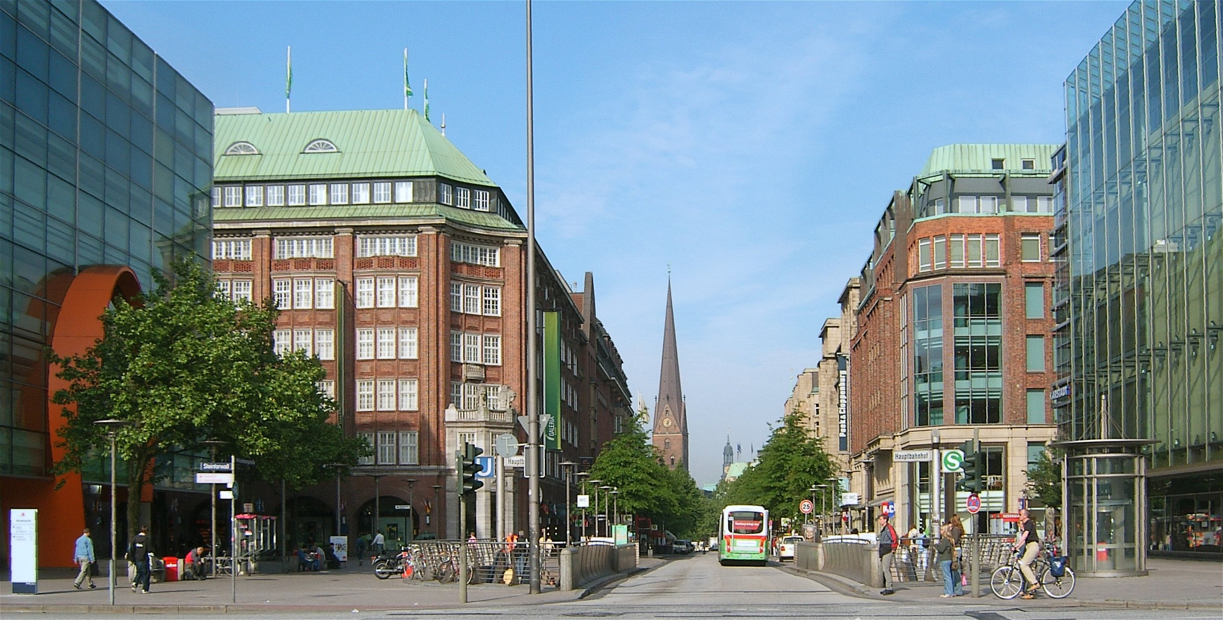 Die Mönckebergstraße in der Hamburger Innenstadt. Links das Klöpperhaus.